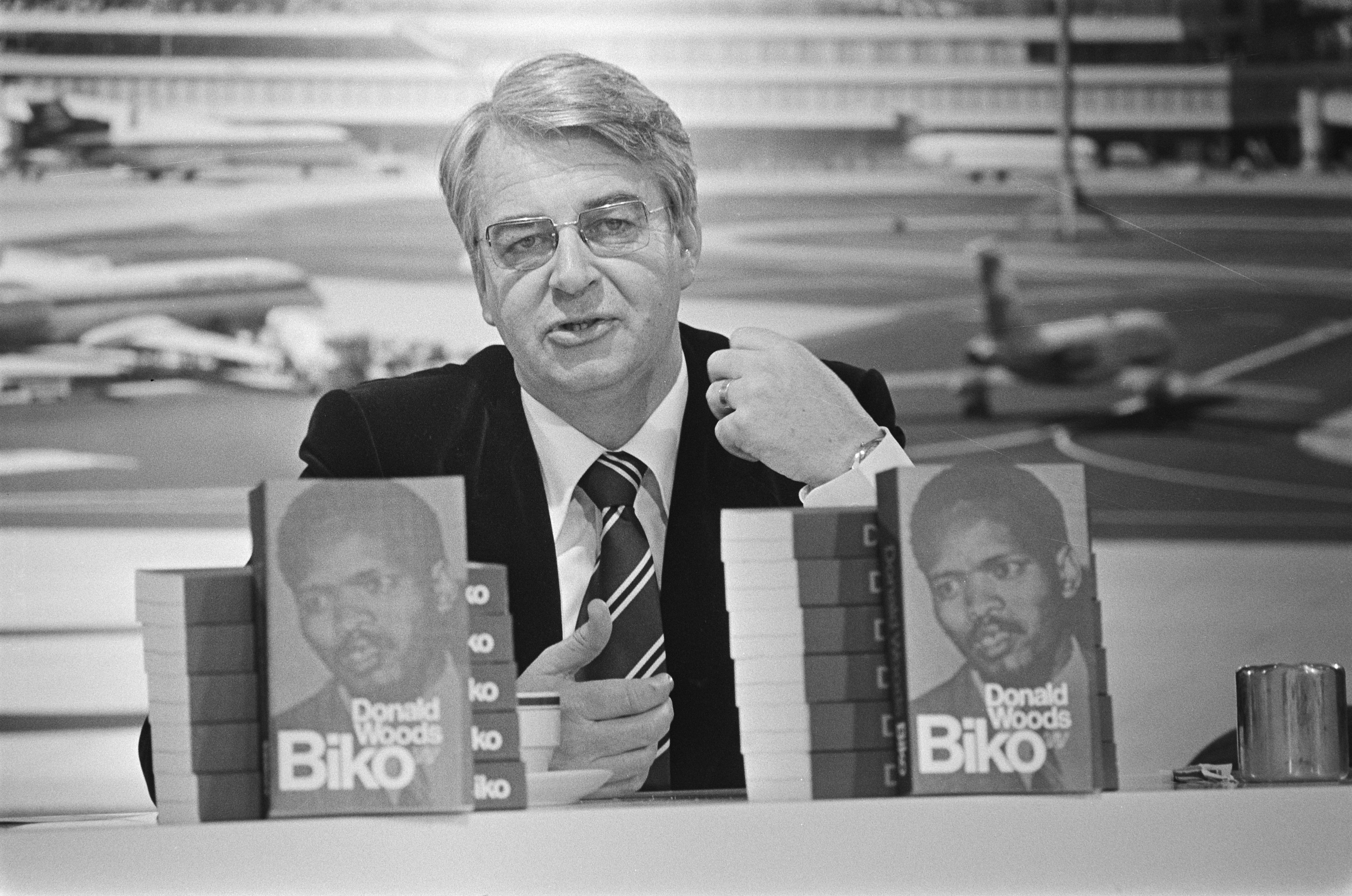 Collectie / Archief : Fotocollectie Anefo Reportage / Serie : [ onbekend ] Beschrijving : Zuidafrikaan Donald Woods op Schiphol in verband met Nederlandse vertaling van zijn boek over Steve Biko Datum : 3 juli 1978 Locatie : Noord-Holland, Schiphol Trefwoorden : auteurs, boeken Fotograaf : Verhoeff, Bert / Anefo Auteursrechthebbende : Nationaal Archief Materiaalsoort : Negatief (zwart/wit) Nummer archiefinventaris : bekijk toegang 2.24.01.05 Bestanddeelnummer : 929-8037